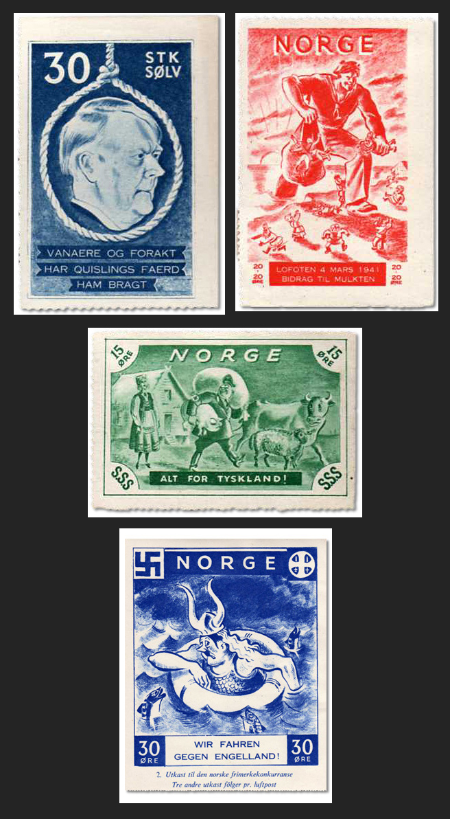 Britische Propagandafälschungen für das von Deutschland im 2. Weltkrieg besetzte Norwegen.